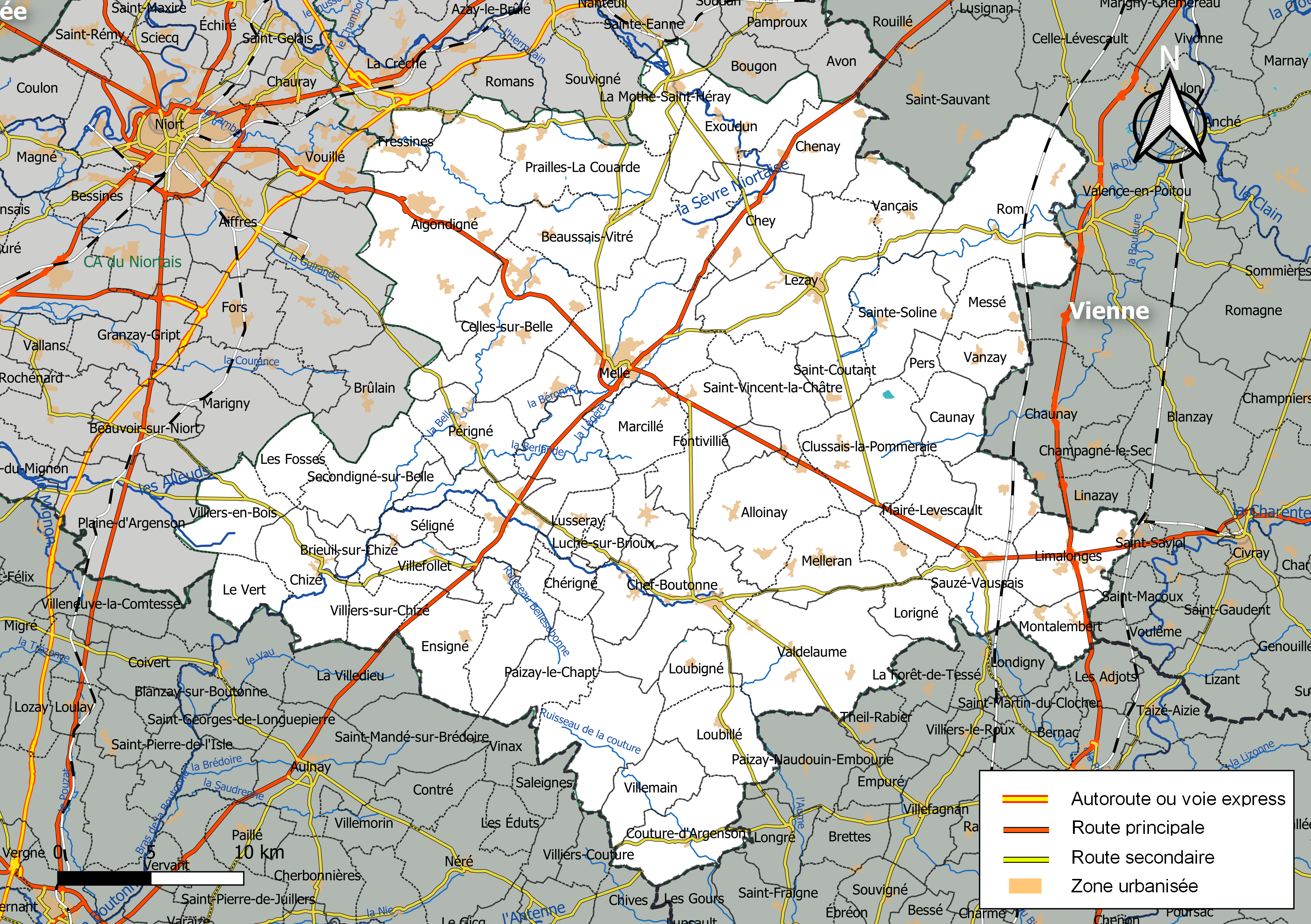 Carte géographique de la Communauté de communes Mellois en Poitou, département des Deux-Sèvres, France. Composition au 1er janvier 2019.